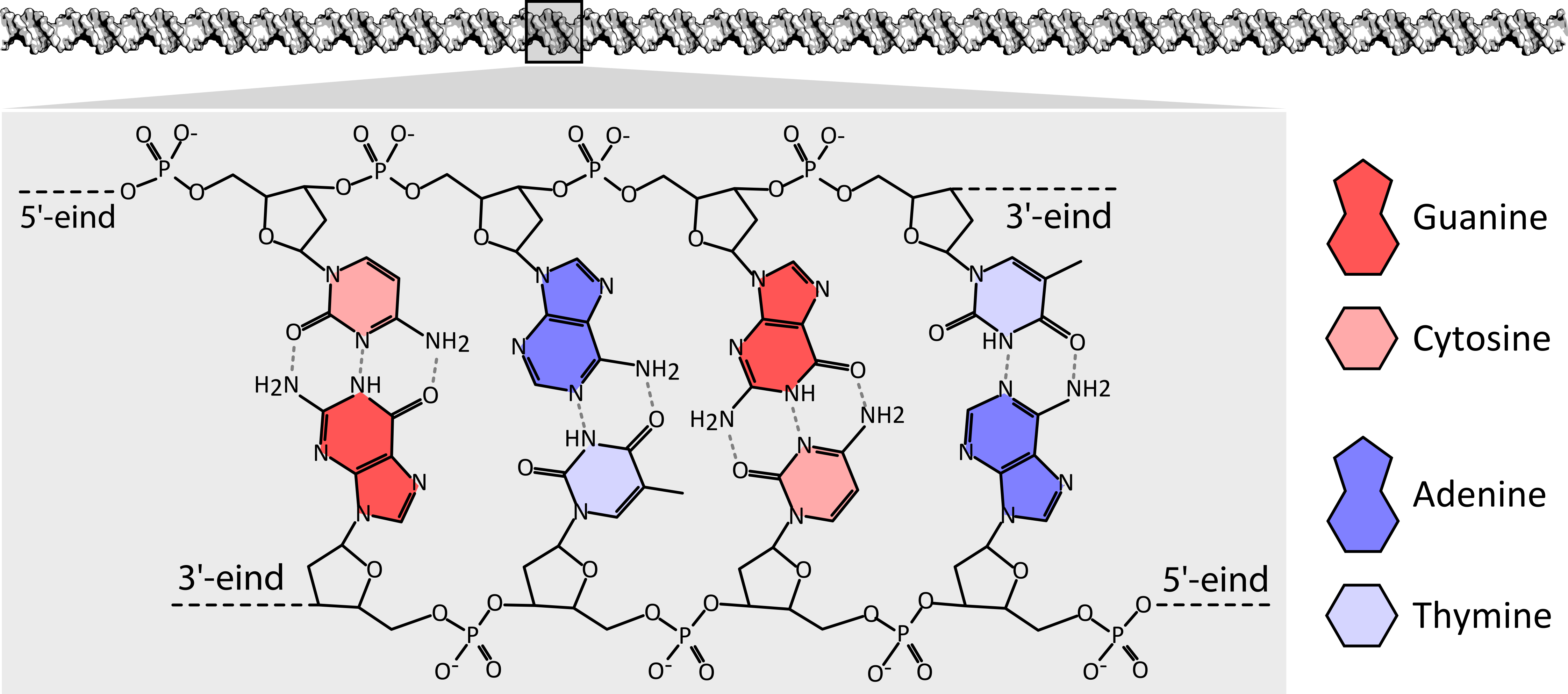 Chemische structuur van DNA